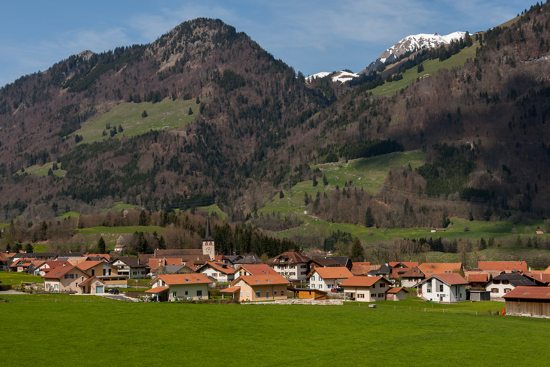 Grandvillard (FR)